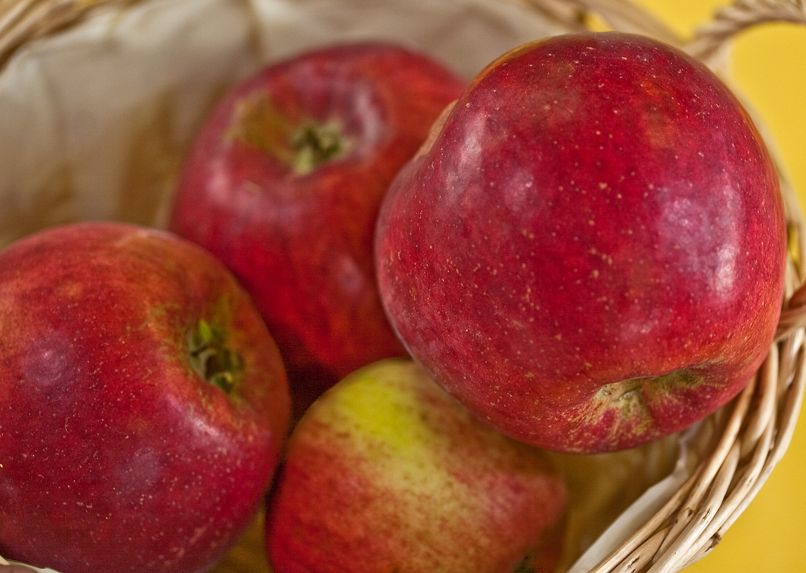 Der Kardinal Bea ist eine Apfelsorte